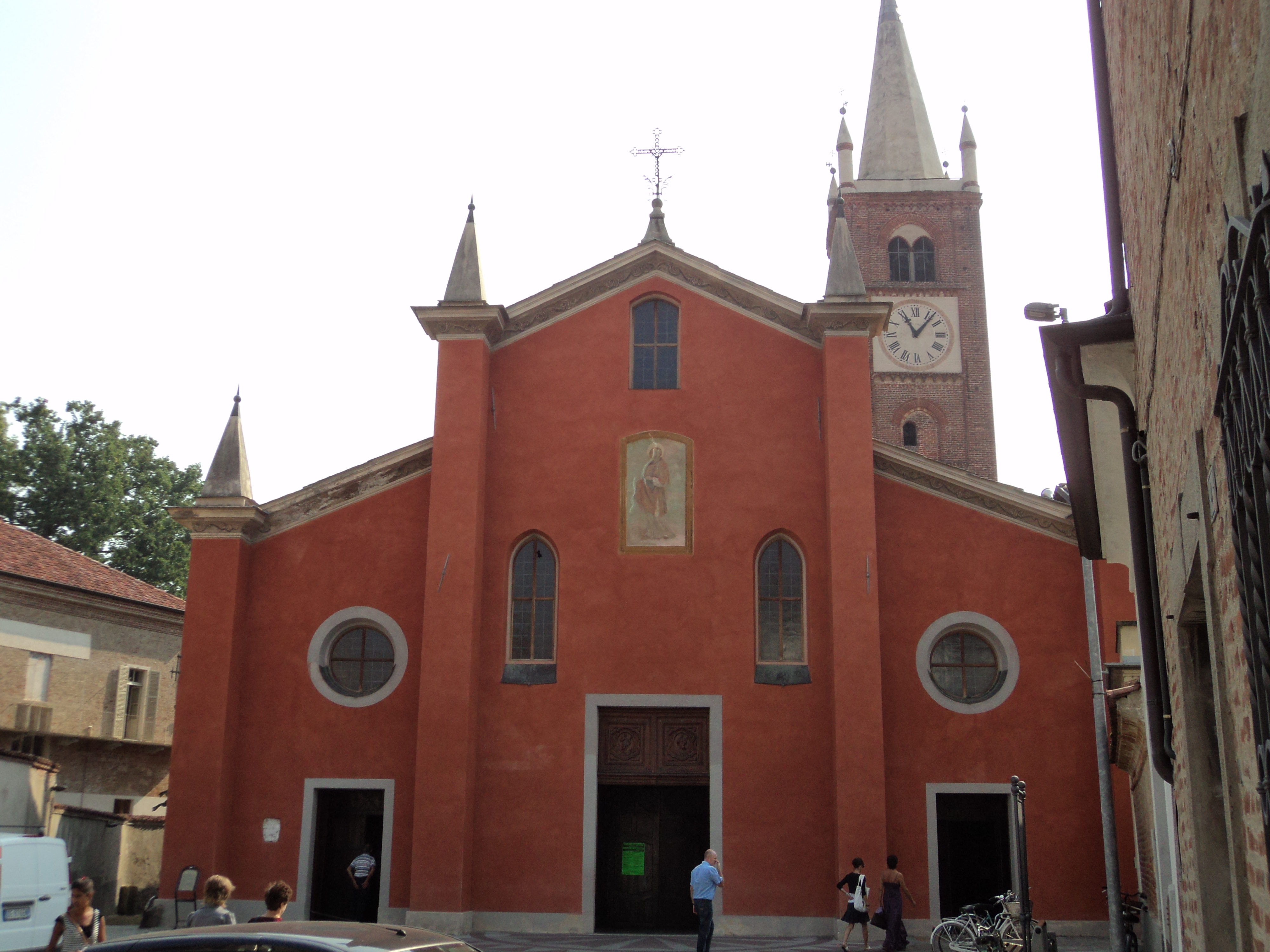 Chiesa Parrocchiale di Santo Stefano - Villafranca Piemonte - Provincia di Torino